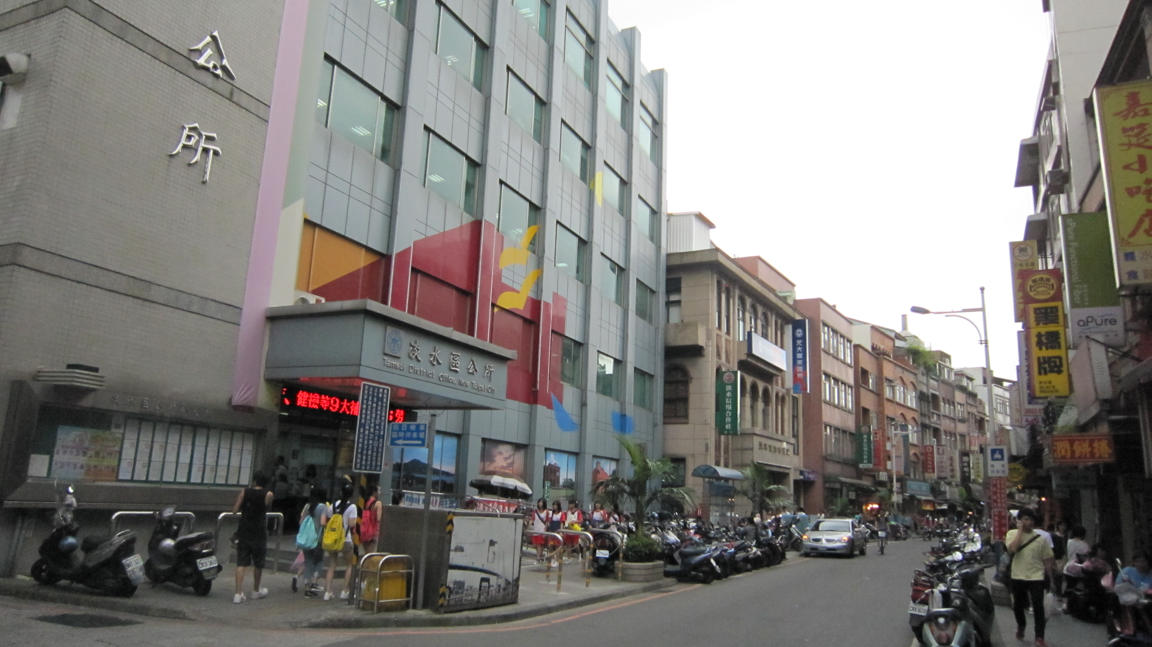 Tamsui 淡水老街